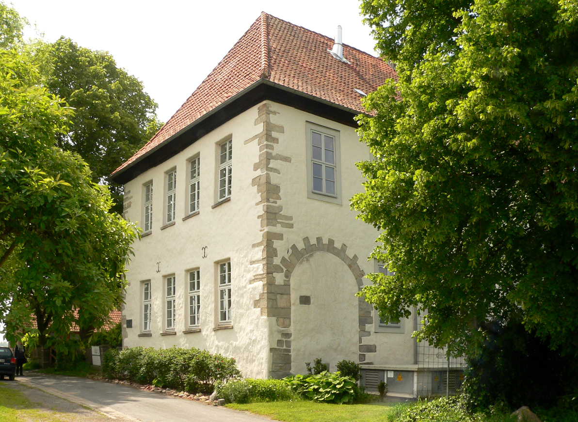 Ansicht von Schloss Bokeloh